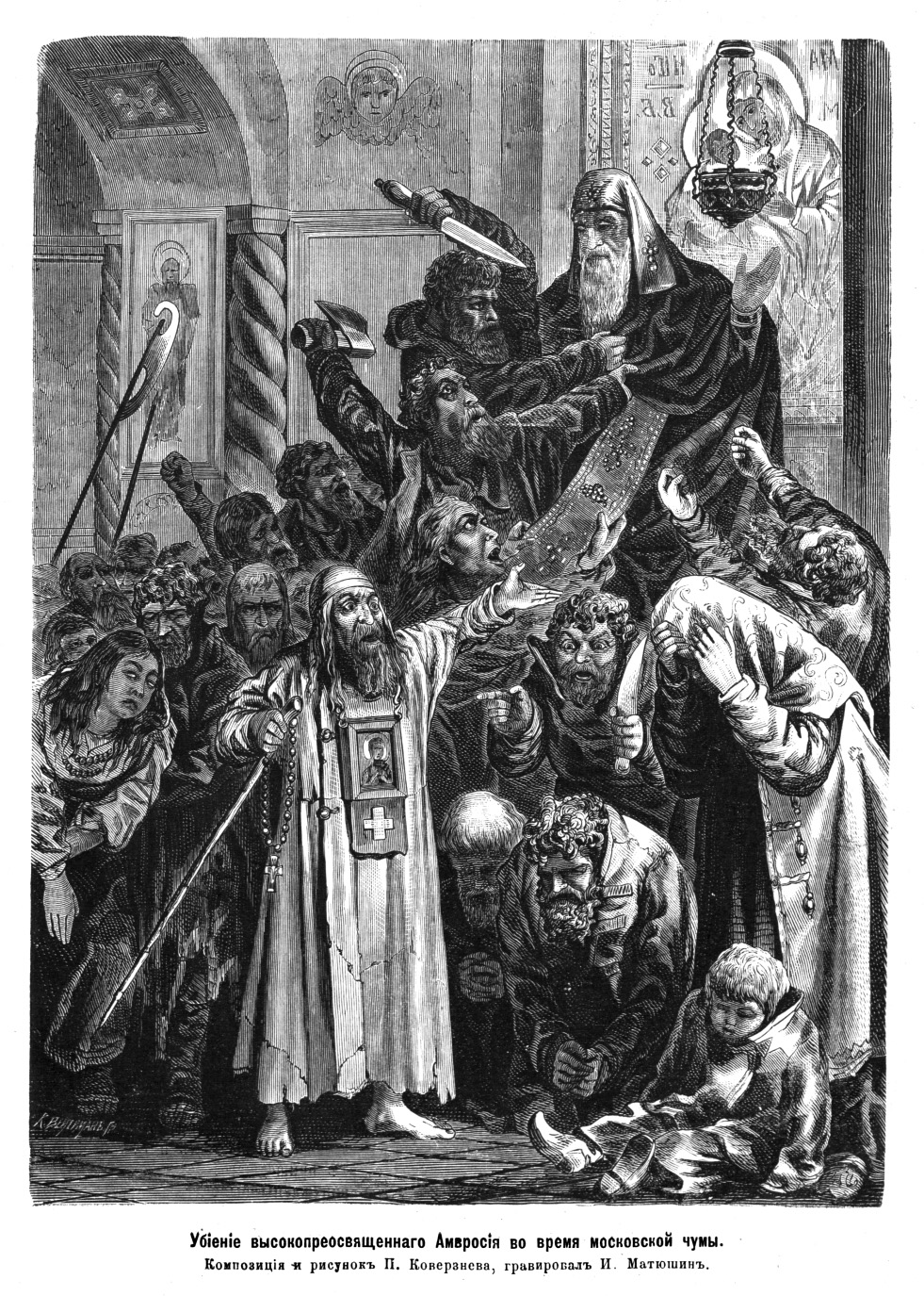 Чумной бунт в Москве (1771): убийство Амвросия; "Убиение высокопреосвященного Амвросия во время московской чумы" (1872)